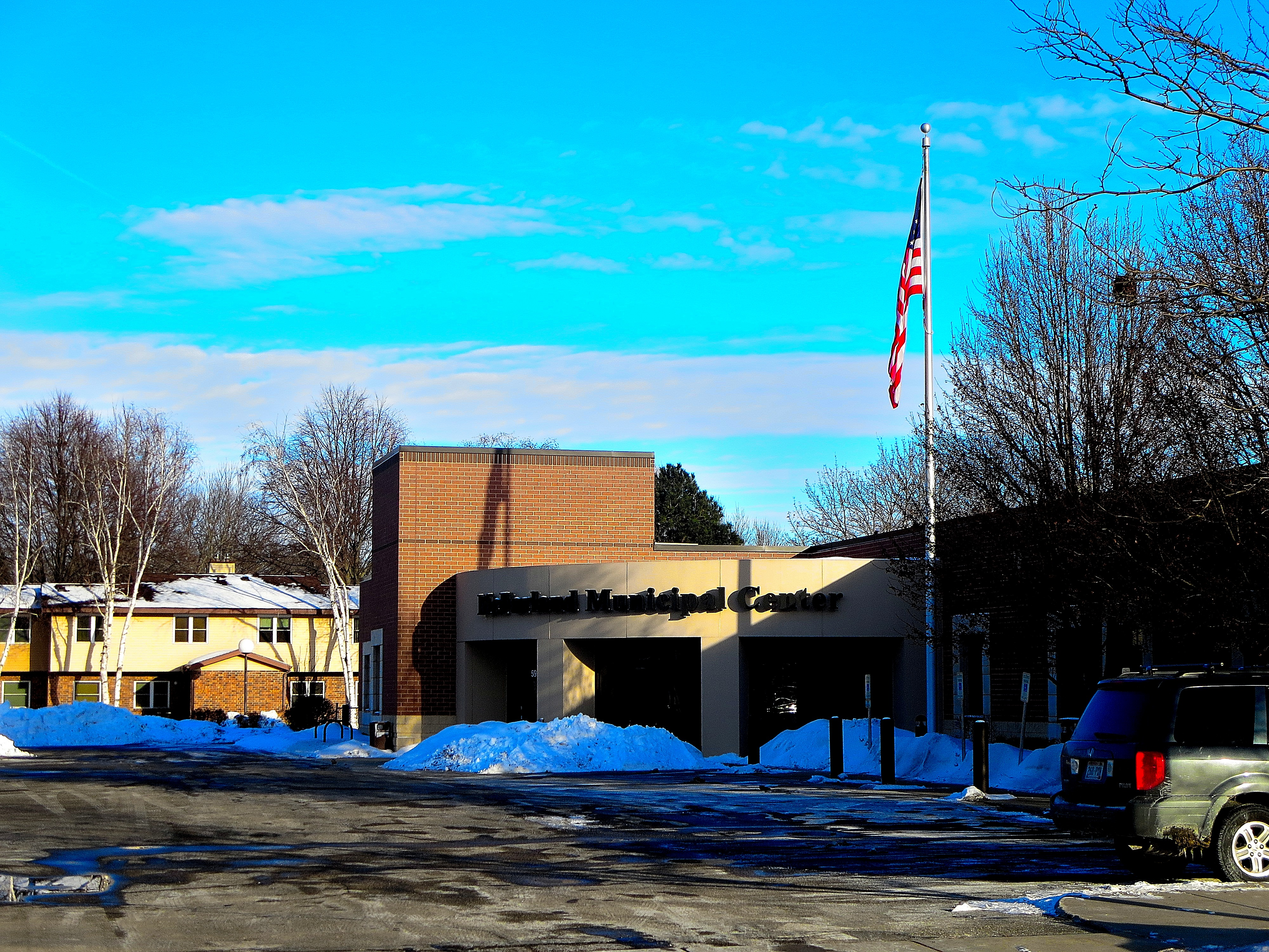 McFarland Municipal Center